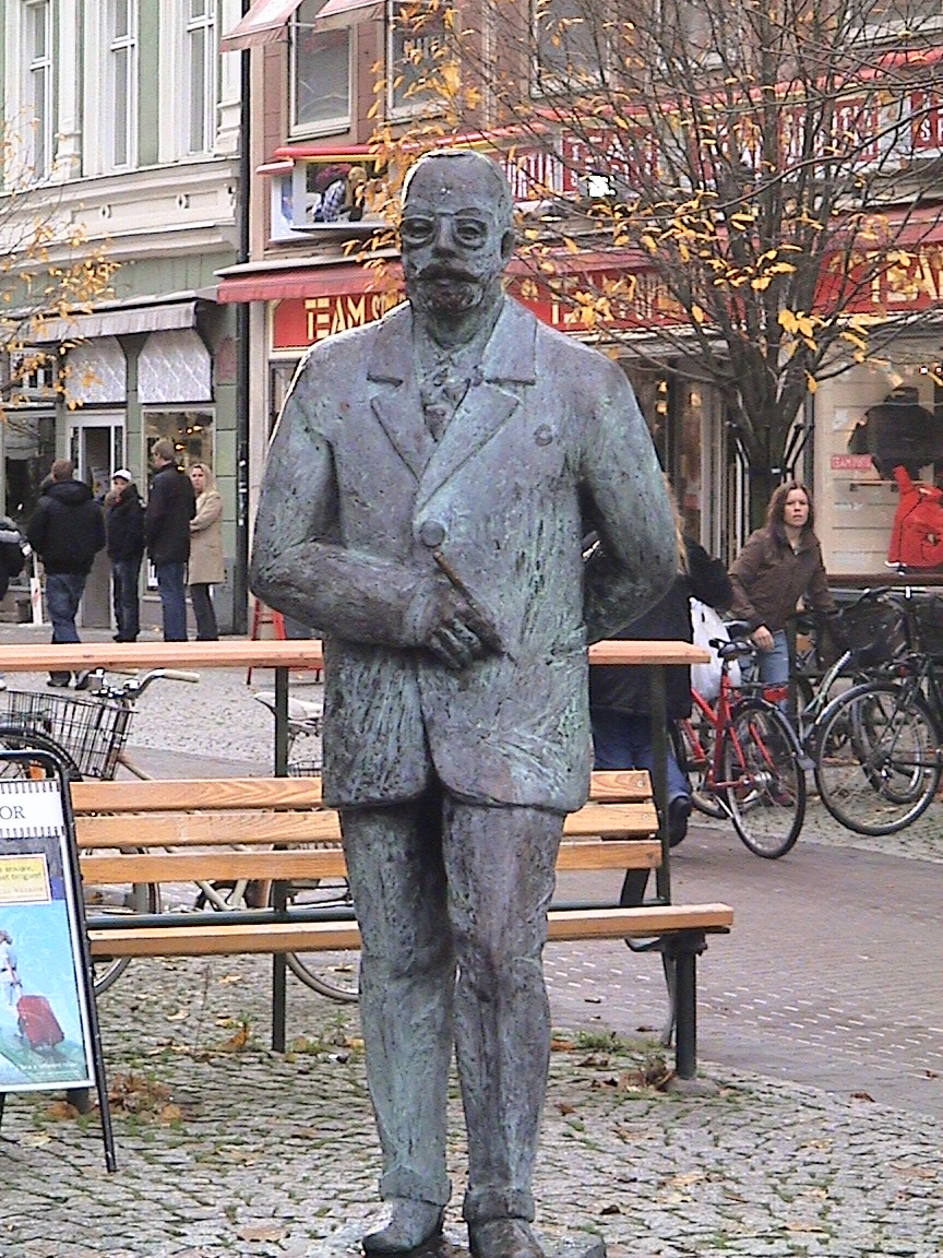 A statue of Gustaf Fröding in Karlstad, Sweden